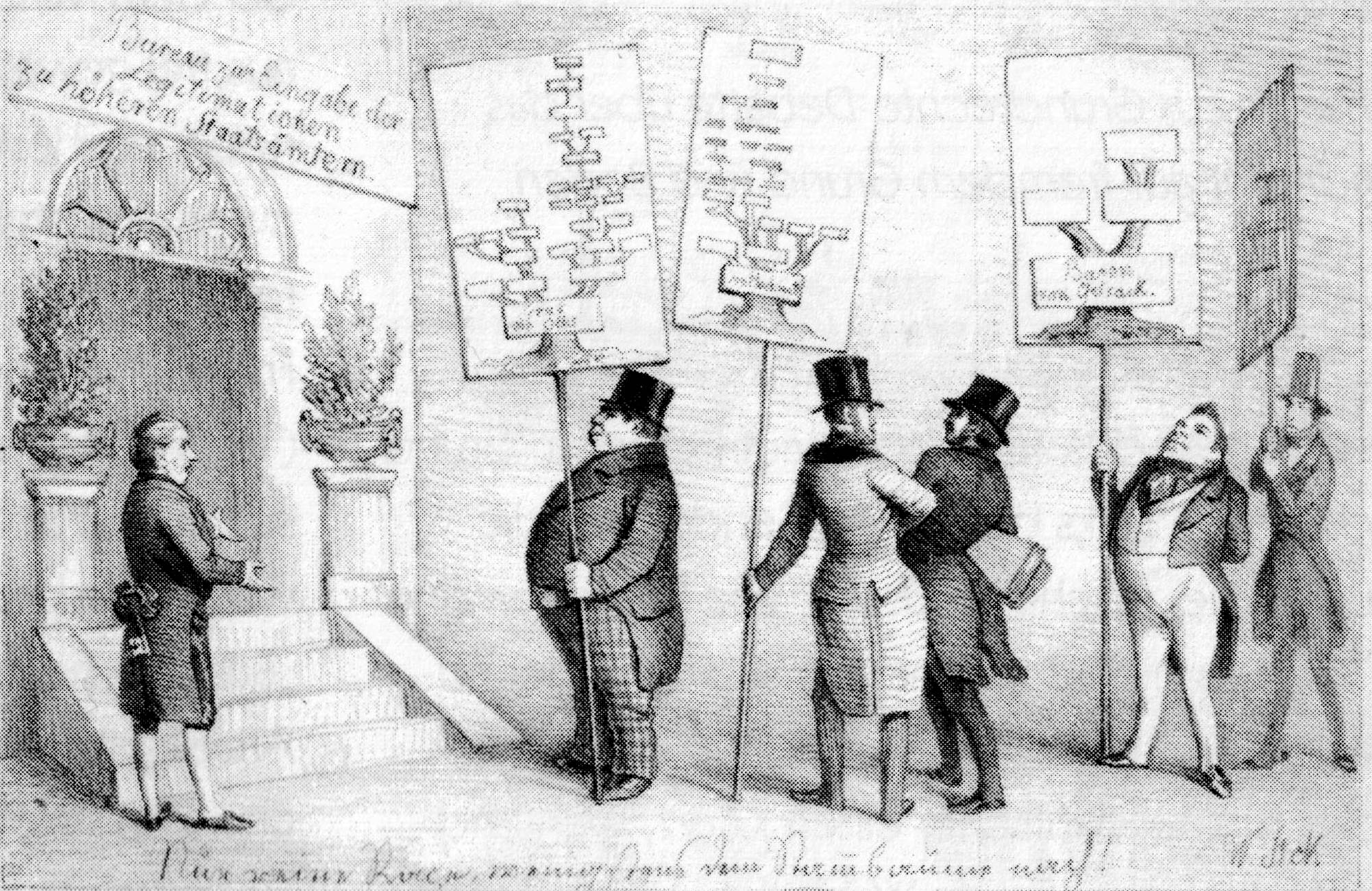 Lithographie, Wilhelm Storck. 1848. “Nur reine Race, wenigstens dem Stammbaum nach.” Grundrechte, Adel.